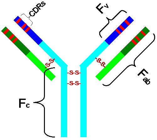 מבנה נוגדן IgG- תכלת- האזור הקבוע בשרשרת הכבדה. ירוק בהיר- האזור הקבוע בשרשרת הקלה. כחול- האזור המשתנה בשרשרת הכבדה. ירוק כהה- האזור המשתנה בשרשרת הקלה. אדום- שרשראות ה CDR- אזורים משתנים קושרי אנטיגן